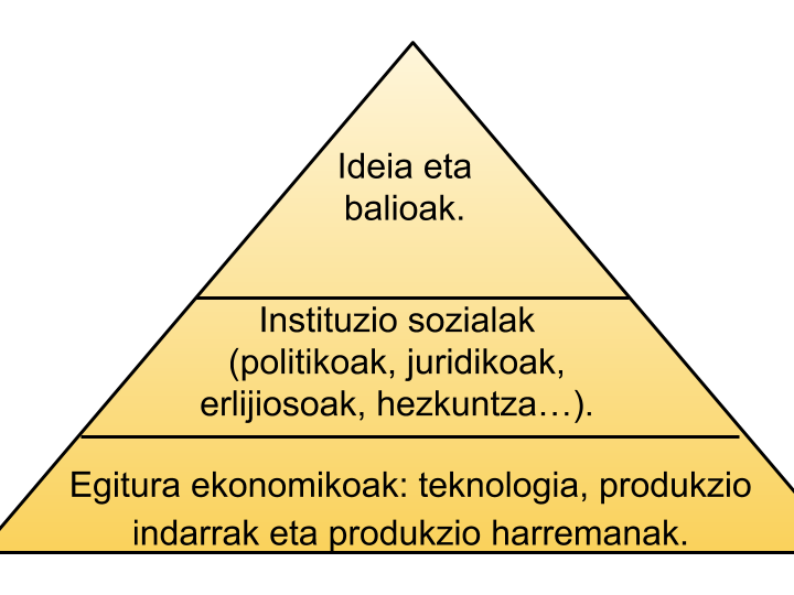 Piramide honen arabera, gizarteen bilakaera faktore ekonomiko eta teknologikoek gobernatzen edo mugatzen dute, hau da, produkzio mailan eta ekonomian gertatzen denak gizarte osoari ematen dio itxura. Horrela, teknologiek, produkzio indarrek eta produkzio harremanek instituzio sozialak (politikoak, erlijiosoak, hezkuntza, familia…) determinatzen dituzte eta hauek, modu berean, gizabanakoen ideia eta balioei ematen diete itxura.